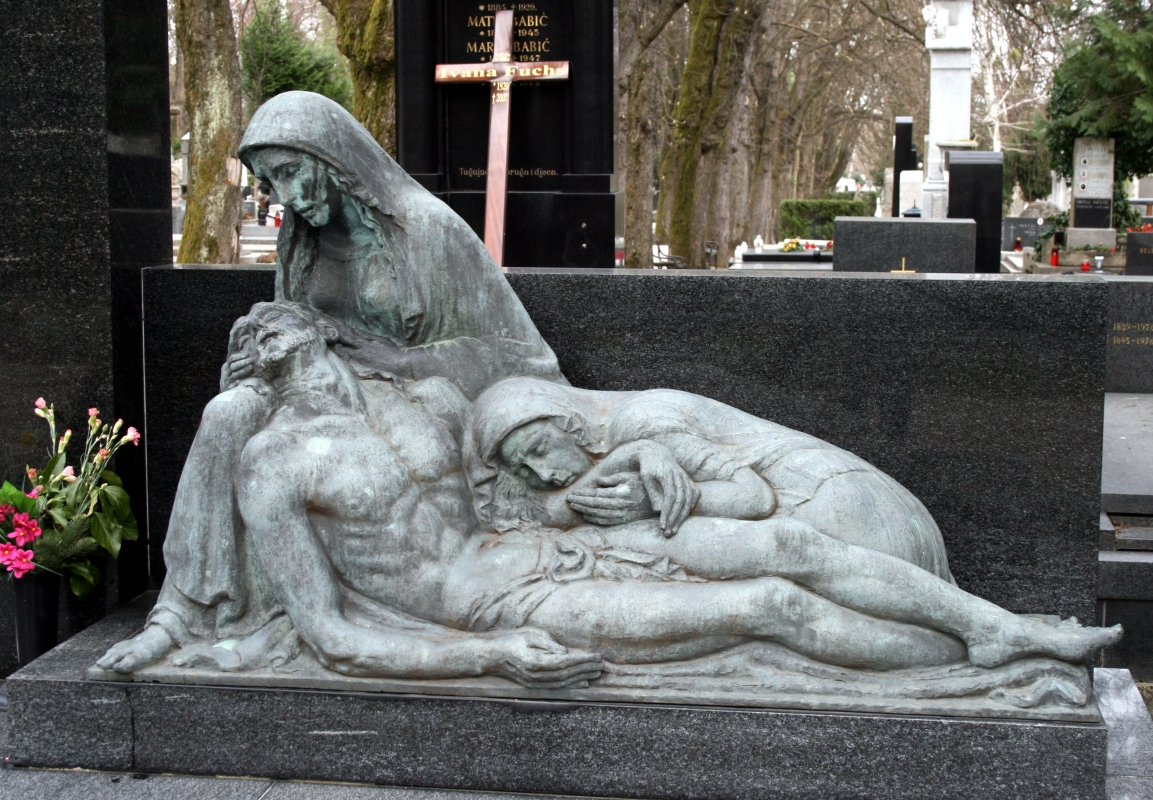 djelo Ive Kerdića na grobu obitelji Matko na Mirogoju, Zagreb, Hrvatska